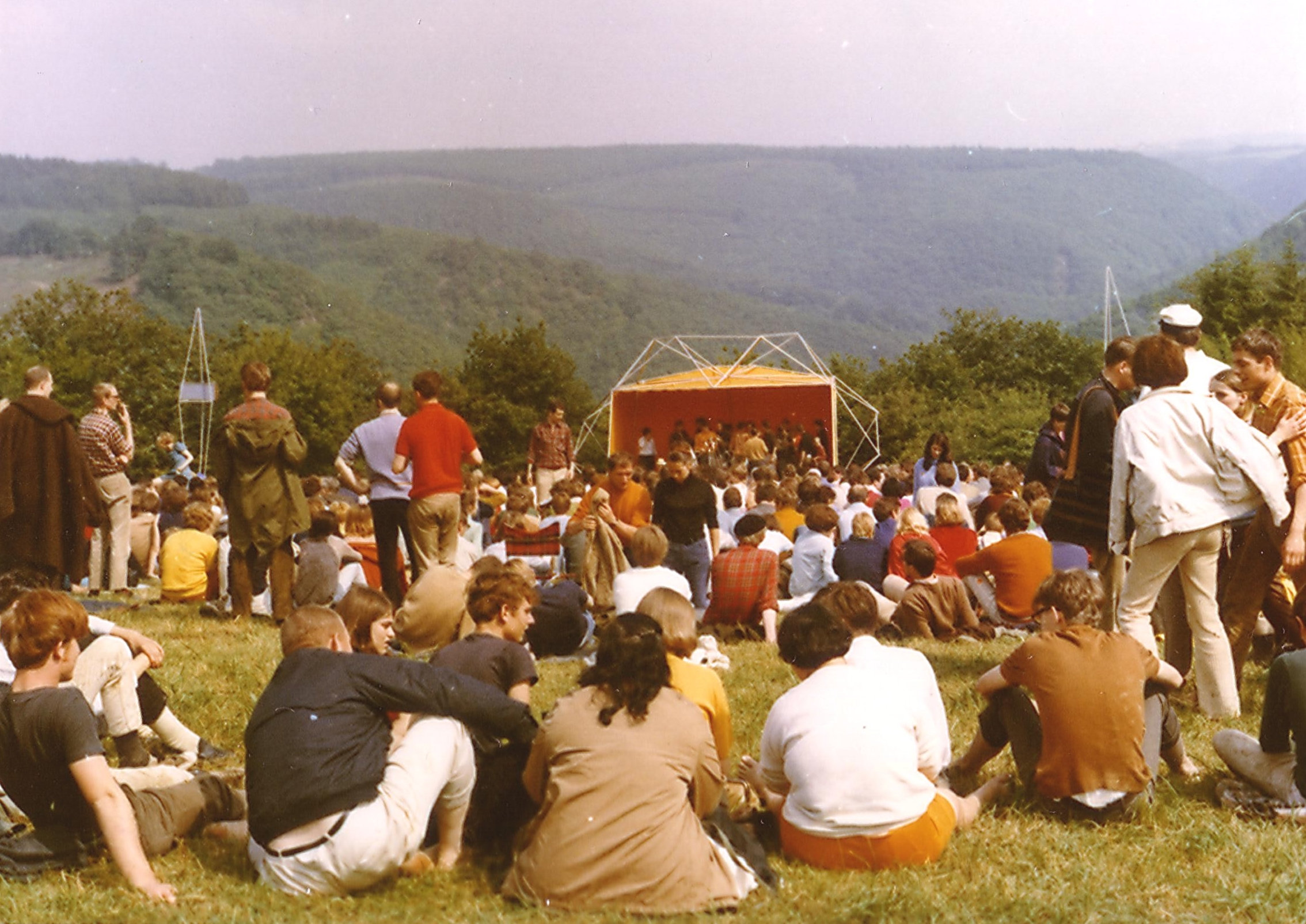 Publikum auf dem Gelände der Burg Waldeck oberhalb des Baybachtals während des Burg Waldeck Festivals 1968